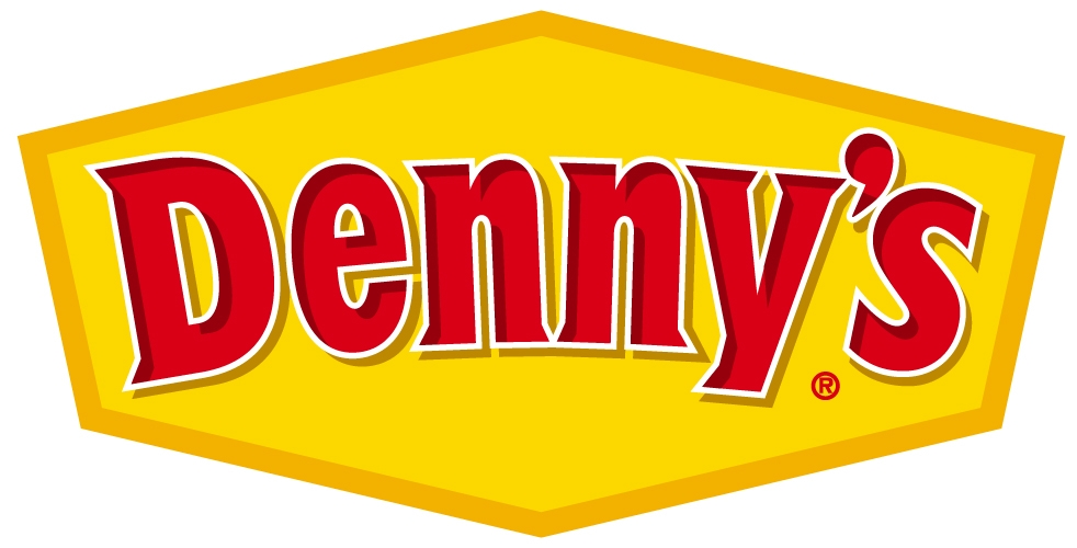 Denny´s